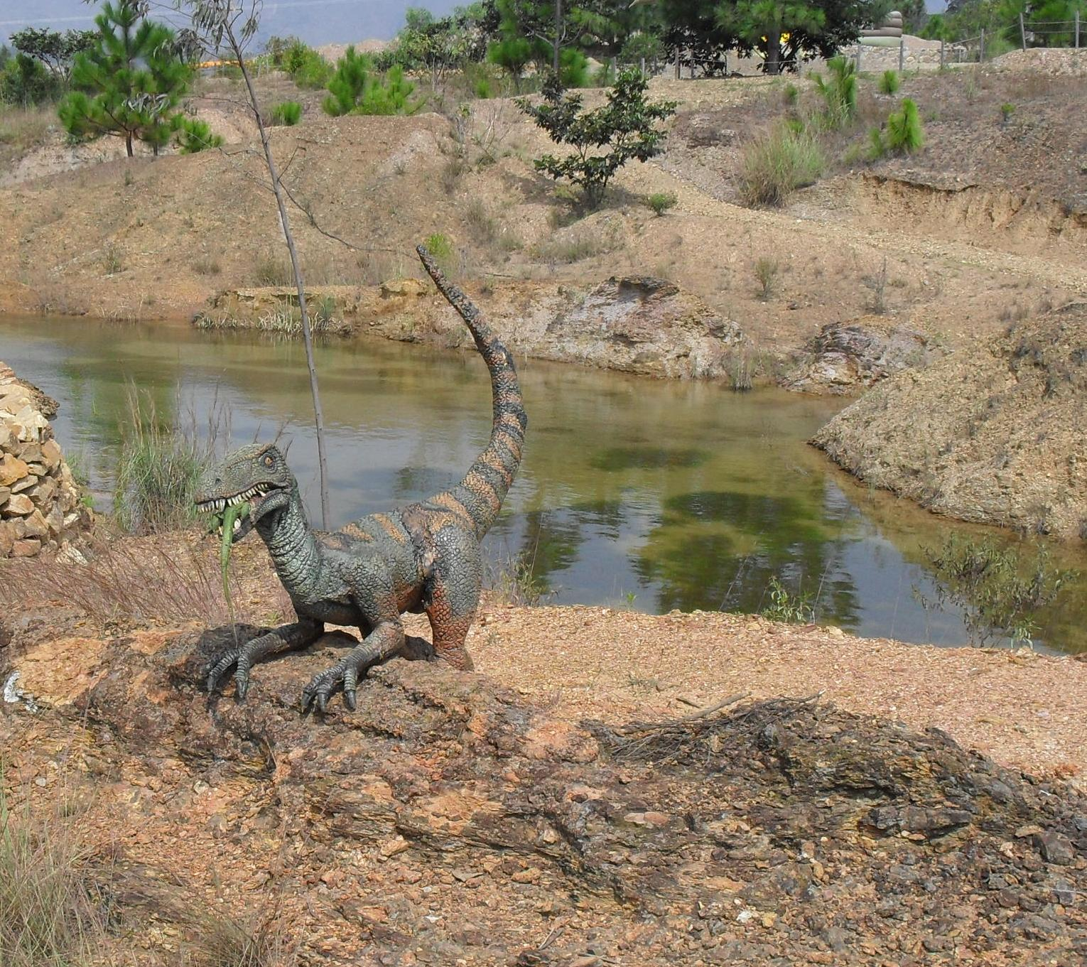 Velociraptor en el parque temático Gondava, en el departamento de Boyacá, Colombia